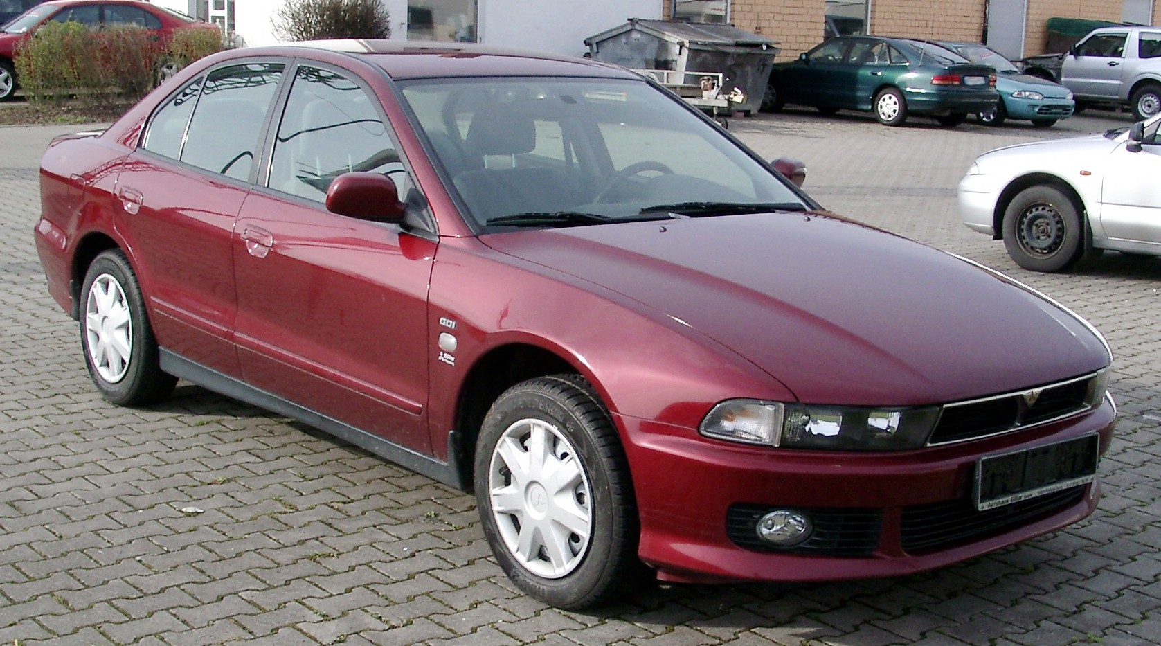 Mitsubishi Galant, 8. Generation